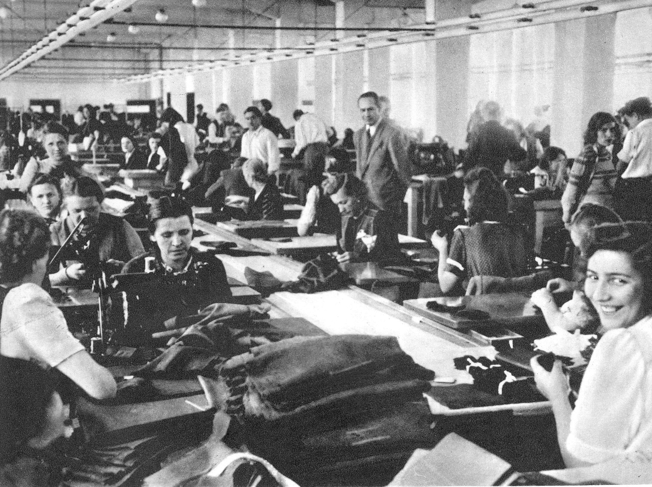 Warszawskie Zakłady Przemysłu Odzieżowego przy ul. Terespolskiej 4